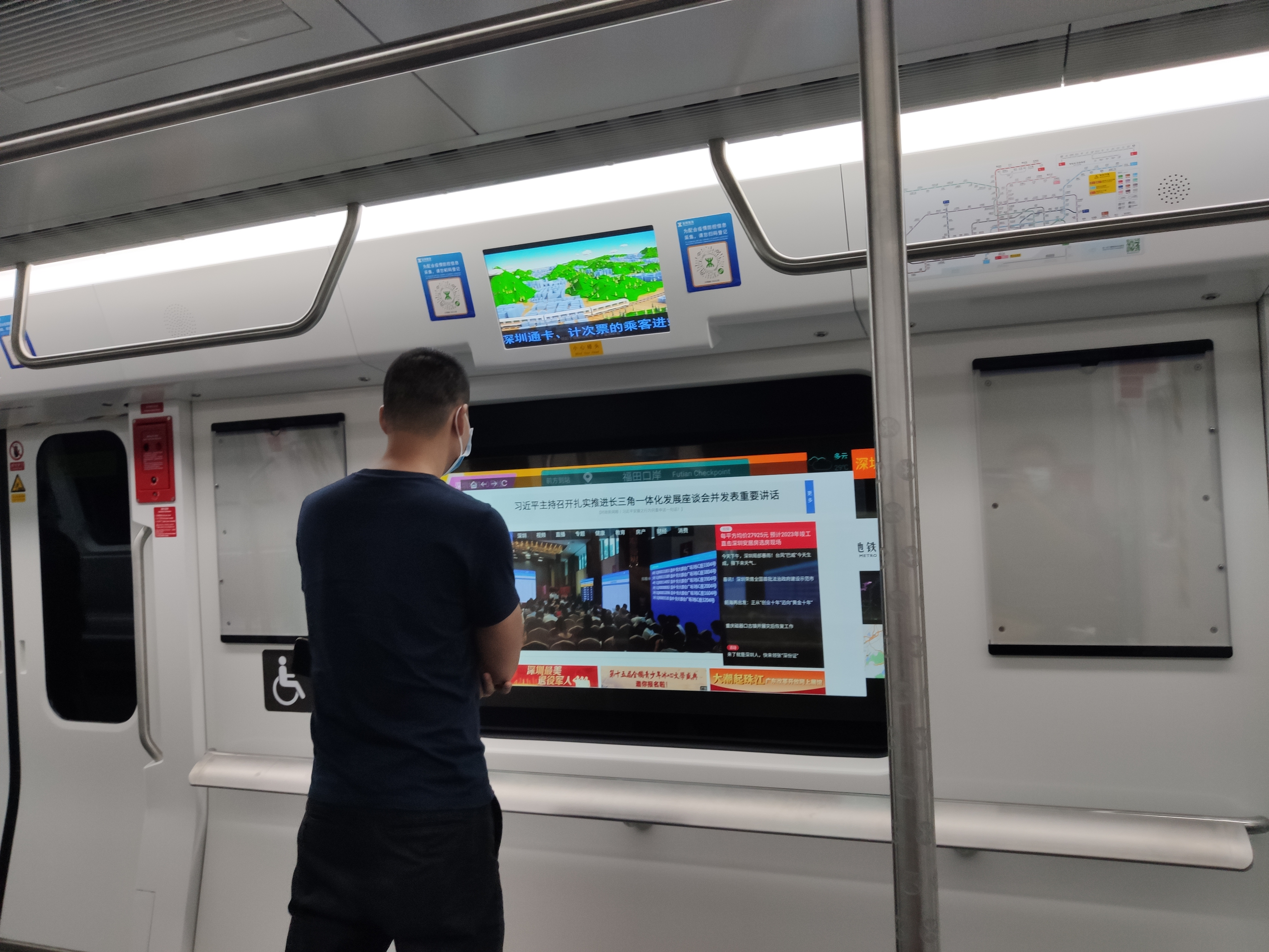 深圳地铁1021号车配备了半透明车窗，可进行交互